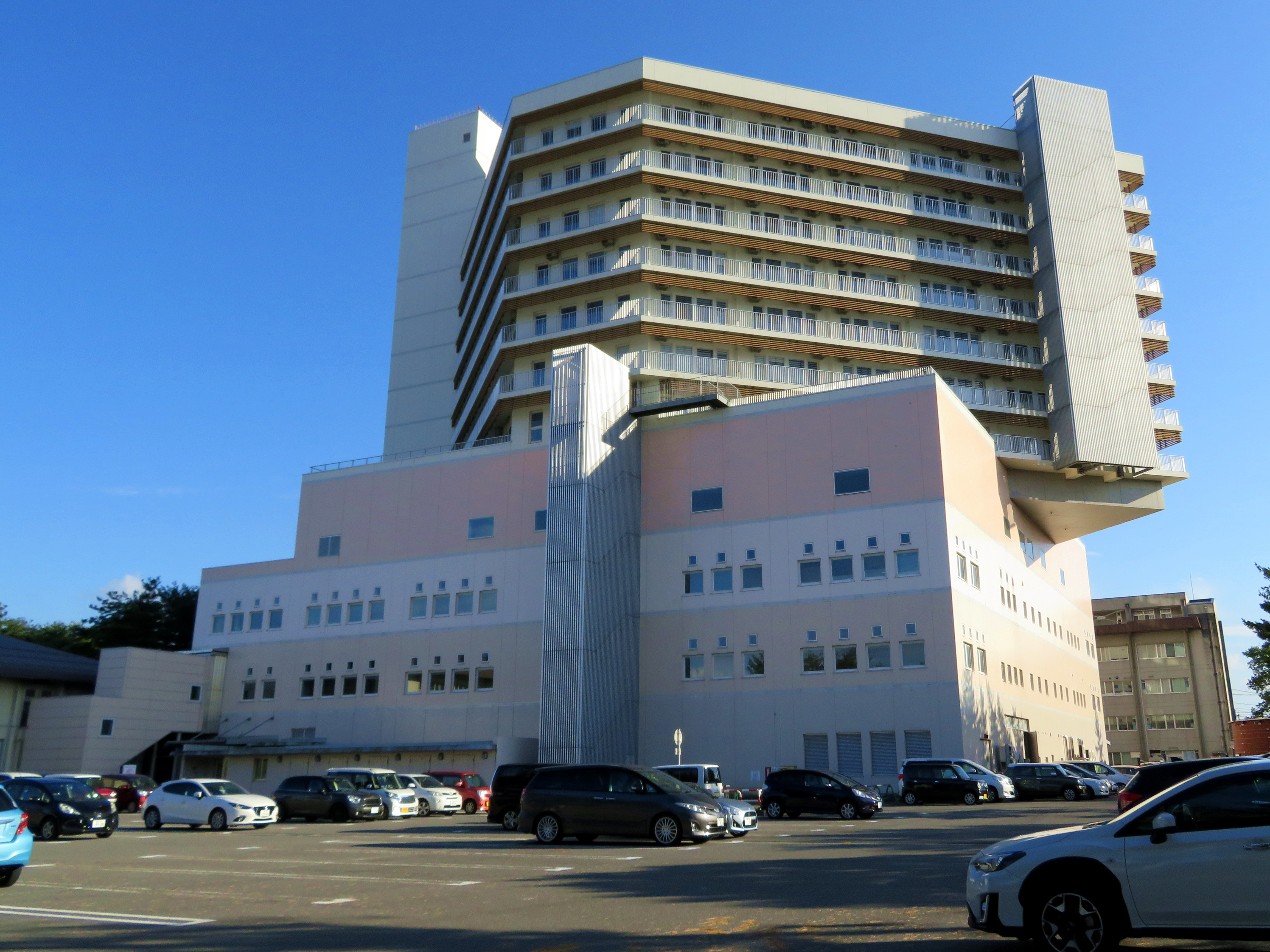 大館市立総合病院 Canon PowerShot SX720 HS